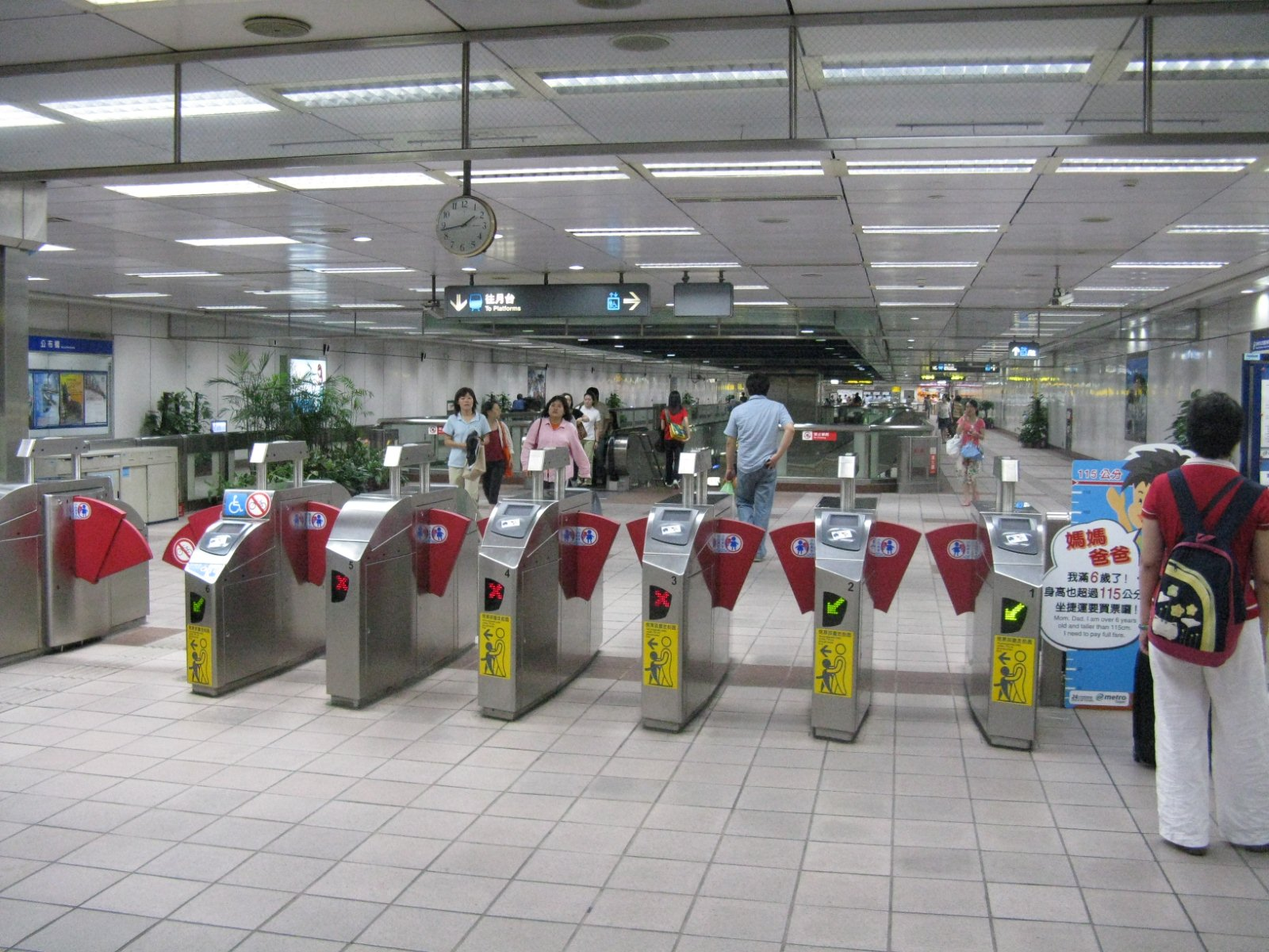 忠孝新生駅地下1階忠孝公園方改札口とコンコース。